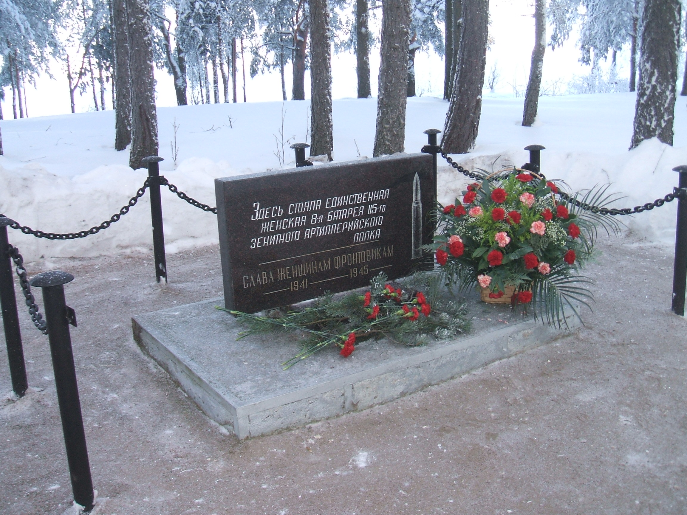 памятник зенитчицам защищавшим небо Ленинграда во время блокады 1941-1944 годов